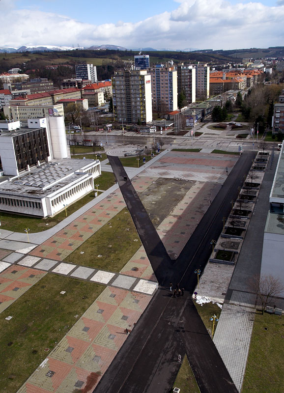 Square beside Hotel Lux. Banská Bystrica, Slovakia. March 2007.